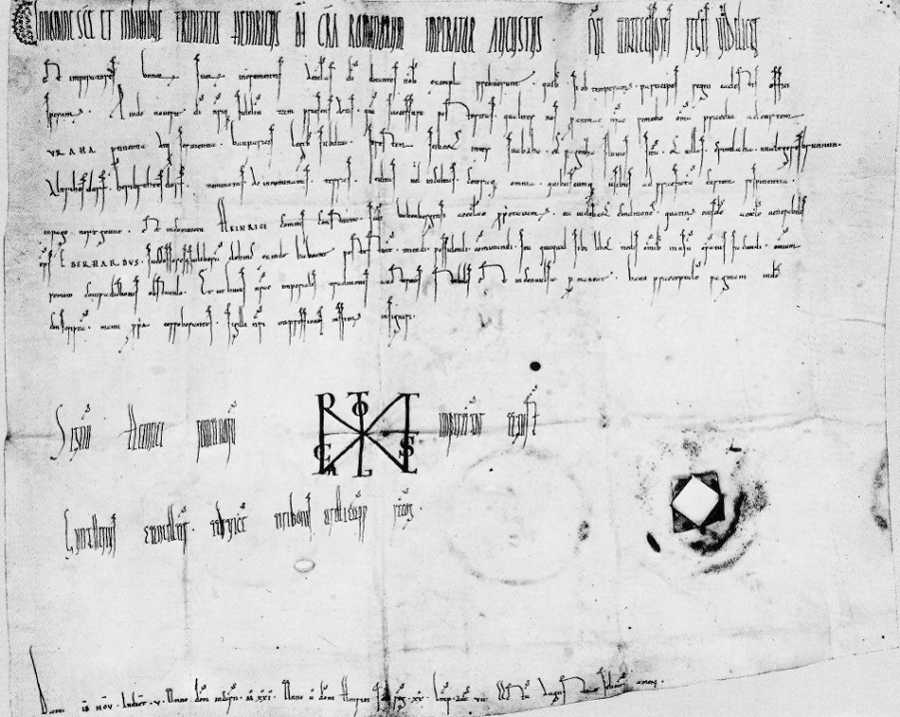 Schenkungsurkunde des Kaisers Heinrich II. (HRR) vom 13. November 1021. Der Text lautet übersetzt: Im Namen der heiligen und unteilbaren Dreifaltigkeit, Heinrich, von Gottes Gnaden erhabener römischer Kaiser. Unsere Vorgänger, die Könige und Kaiser, haben uns, indem sie die göttlichen Kirchen aus ihren zugewachsenen Gütern bereicherten, Beispiele gegeben, durch deren Befolgung wir hoffen, des himmlischen Reiches teilhaftig zu werden. Deshalb sei allen Christgläubigen dem gegenwärtigen Zeitalter wie auch den folgenden Geschlechtern bekannt gemacht, dass wir für unser Seelenheil alle zum Wirtschaftshof Uraha (Aurach) gehörigen und dienenden Güter, die bayerischem Recht unterworfen sind, nämlich den Forst zwischen der Suabaha (Schwabach) und der Pagenza (Pegnitz) und die Dörfer Crintilaha (Großgründlach), Waltgeresbrunnun (Walkersbrunn), Altrihesdorf (Eltersdorf), Heribretesdorf (Herpersdorf), benannte und unbenannte, bebaute und unbebaute Ländereien, überhaupt alle Nutzungen, die zu dem genannten Wirtschaftshof gehören, im Nortgowe (Nordgau) und in der Grafschaft des Grafen Heinrich, der Bamberger Kirche übereignet haben, und zwar unter der Bedingung, dass der verehrungswürdige Bischof dieser Kirche Eberhard und seine Nachfolger freie Gewalt haben sollen, diese Güter zu besitzen, zu vertauschen und was immer sie damit zum Nutzen des Bistums tun wollen, ohne dass das Hindernis eines Einspruchs bestünde. Und damit diese unsere kaiserliche Schenkung eine feste und ungestörte Autorität behält, haben wir diese darüber ausgestellte Urkunde mit eigener Hand bestätigt und befohlen, sie durch Aufdruck unseres Siegels zu beglaubigen. Handzeichen Heinrichs, erhabenen römischen Kaisers. Der Kanzler Gunther hat es in Vertretung des Erzkaplans Aribo bestätigt. Gegeben am 13. November der 5. Indiktion, im Jahre der Menschwerdung des Herrn 1021 und im 20. Jahre des Herrn Heinrich II. als König, im 7. als Kaiser. Geschehen zu Augsburg. Glücklich Amen.